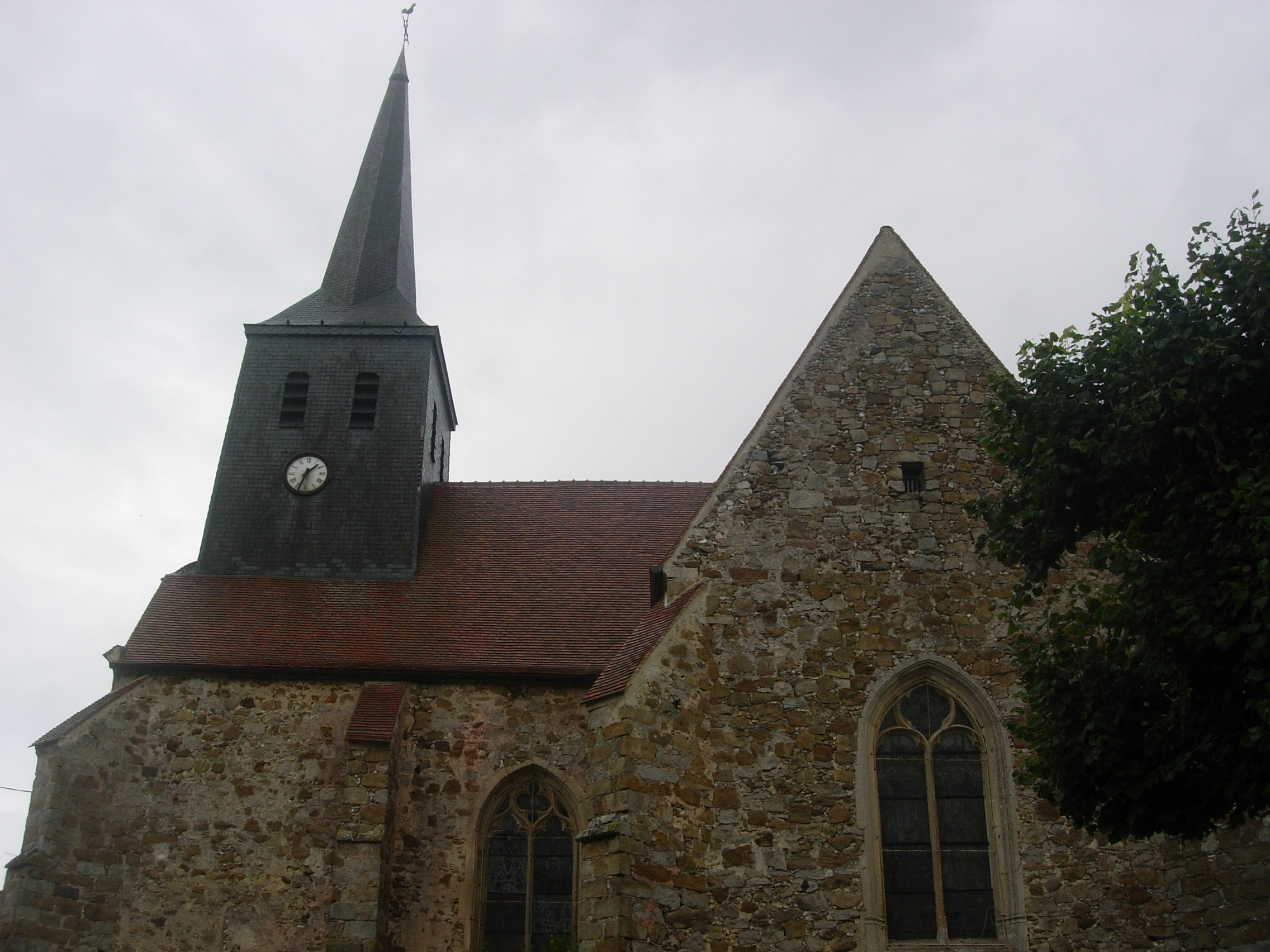 Eglise de la Louptière-Thénard